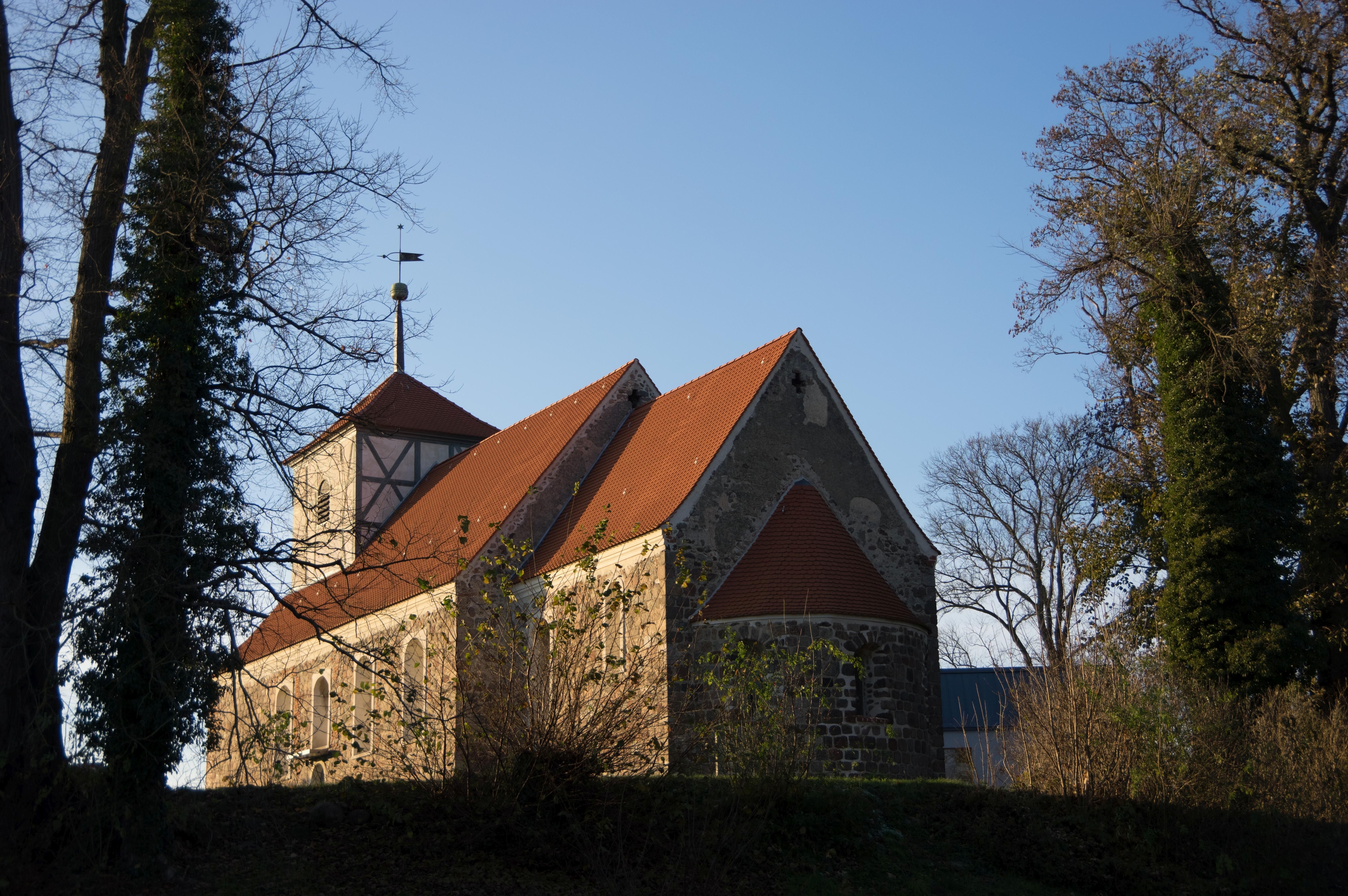 Altlandsberg, Ortsteil Gielsdorf in Brandenburg. Die denkmalgeschützte Kirche in Gielsberg.